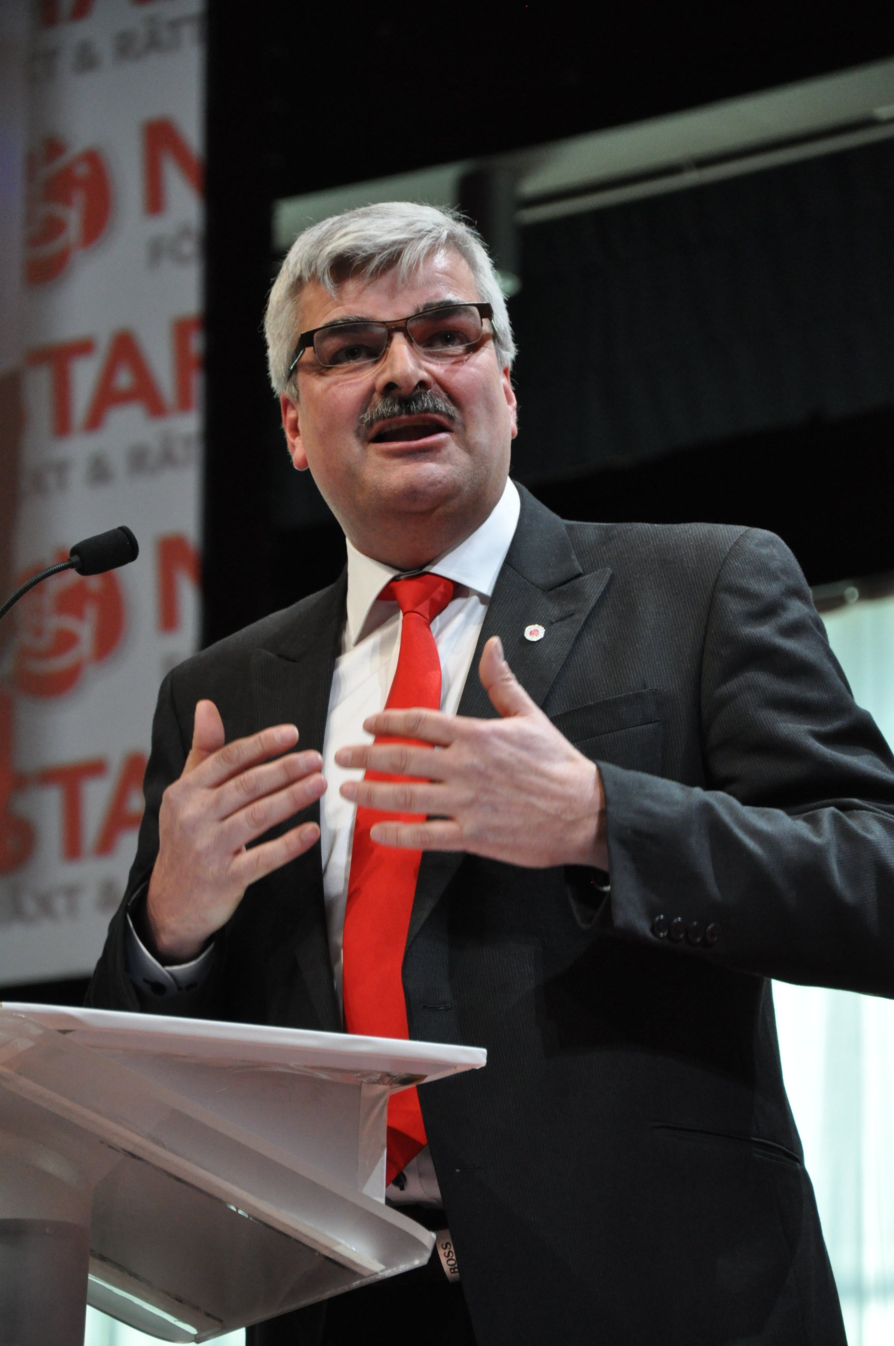 Håkan Juholt håller linjetal på Socialdemokraternas extrakongress, 26-mar-2011